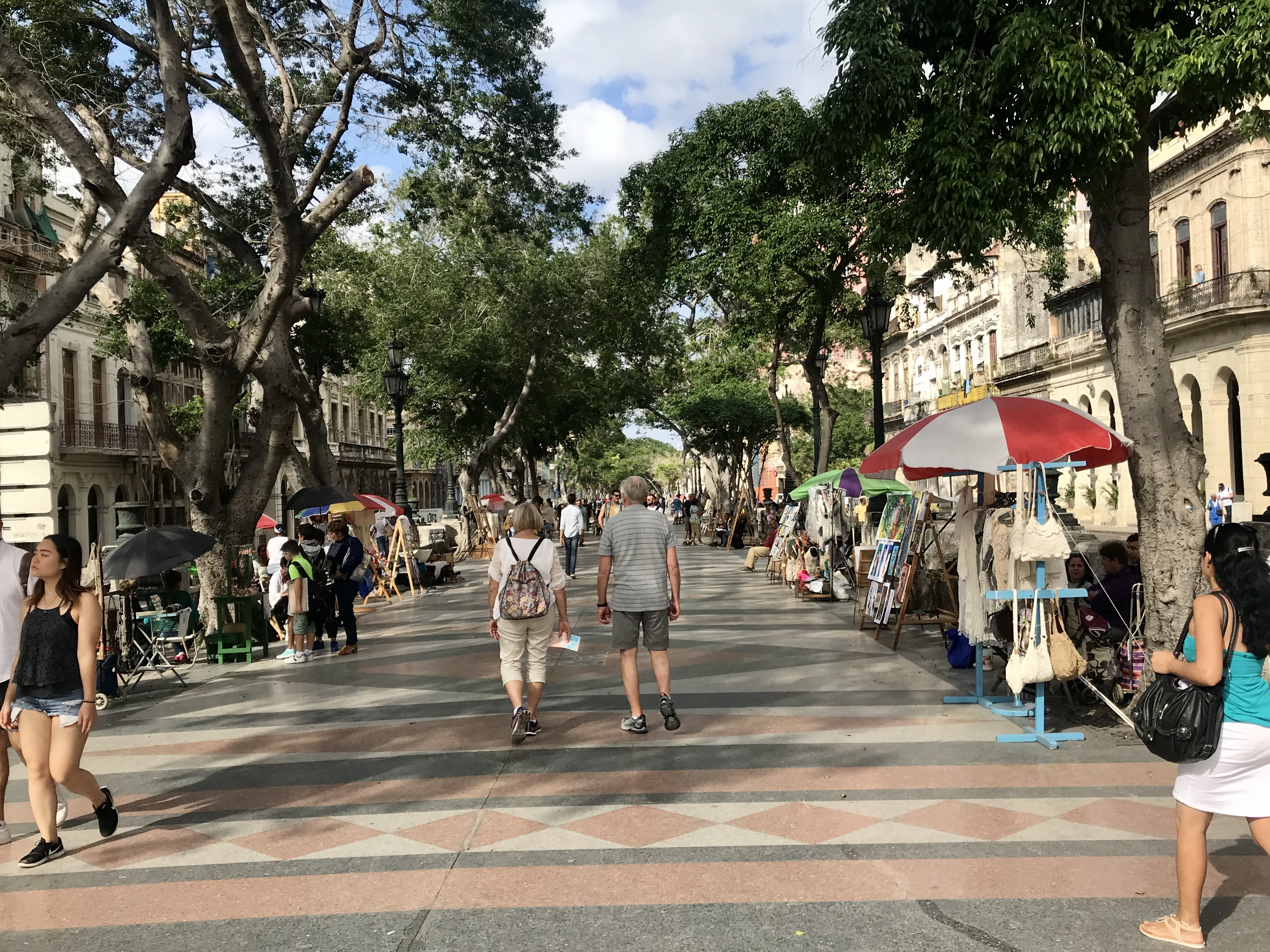 Paseo del prado de La Habana, Cuba